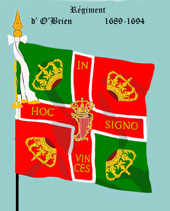 Ordonnanzfahne eines Fremdenregiments im königlich französischen Dienst. - Entnommen und überarbeitet aus: „LES UNIFORMES ET LES DRAPEAUX DE L'ARMÉE DU ROI“ Marseille 1899. (Drapeau d'Ordonnance d' un régiment etranger au service française.)